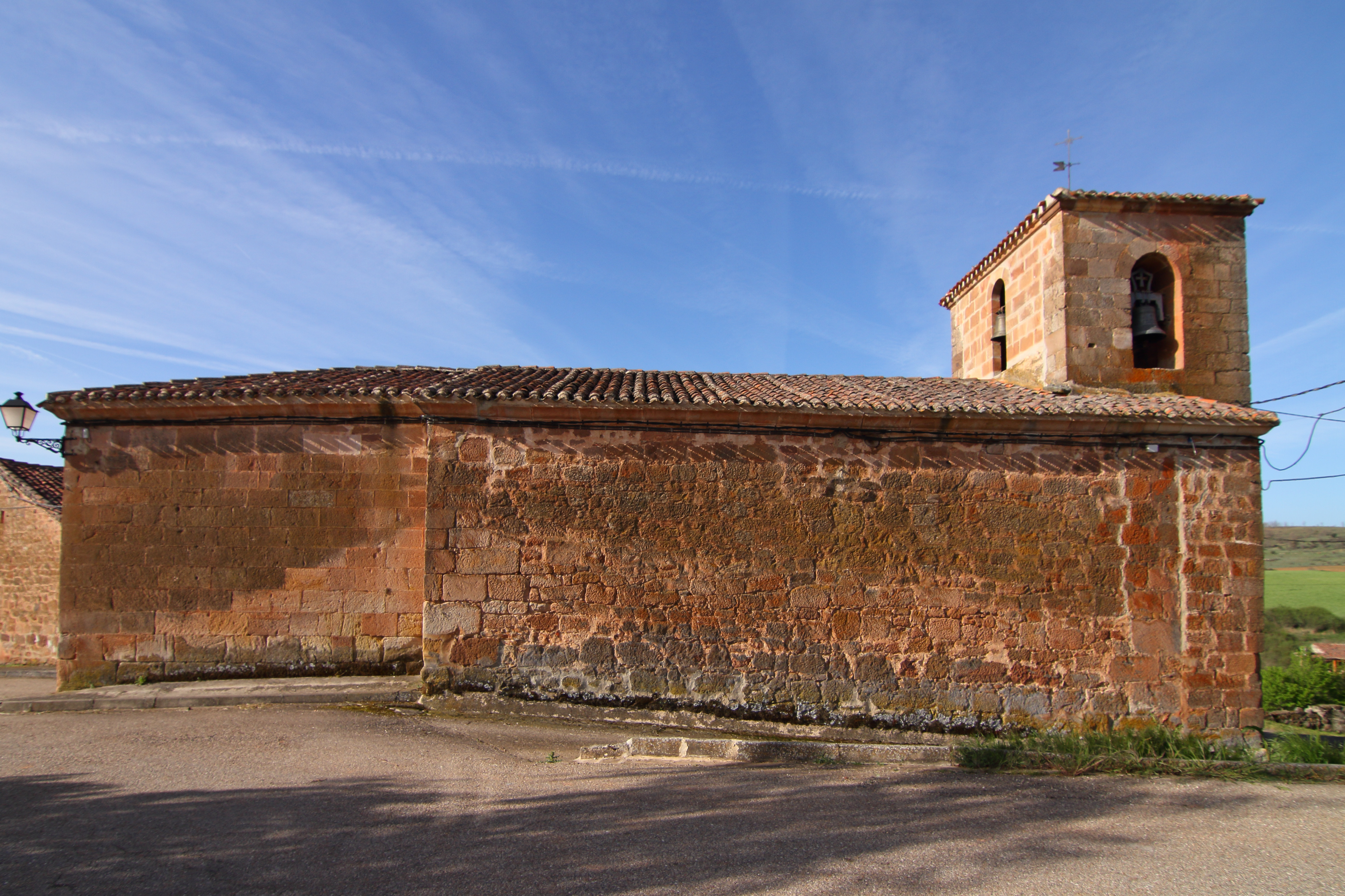 Campolara, Iglesia de Santa Catalina, 01